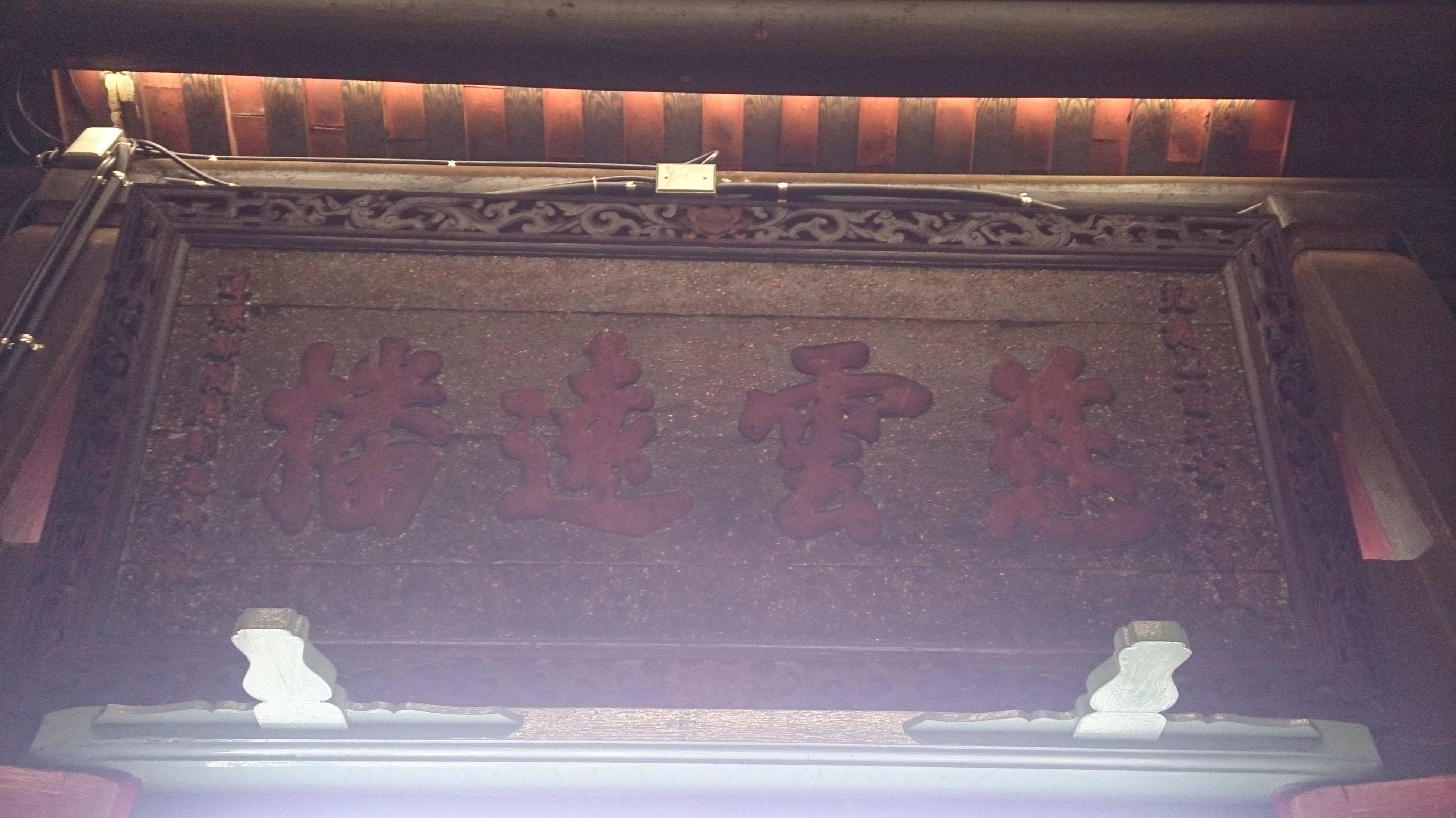 大崗山超峰寺《慈雲遠播》匾(光緒十一年道標都閫府鄭超英敬獻)